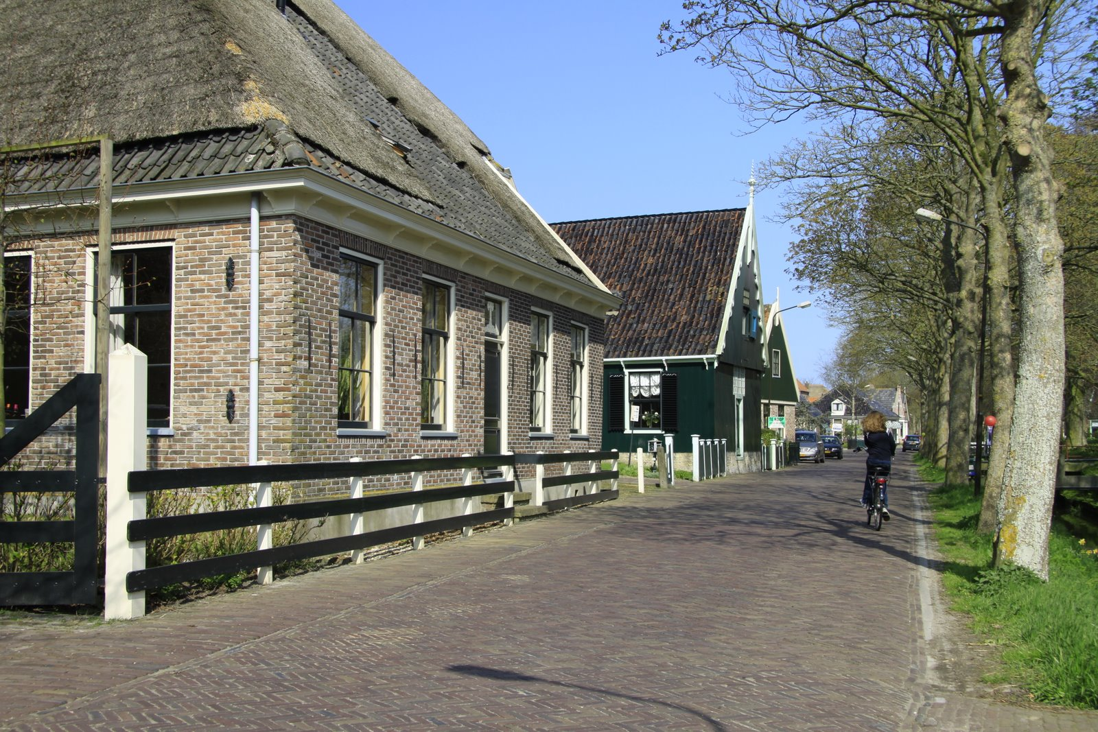 Twisk heeft een beschermd dorpsgezicht.